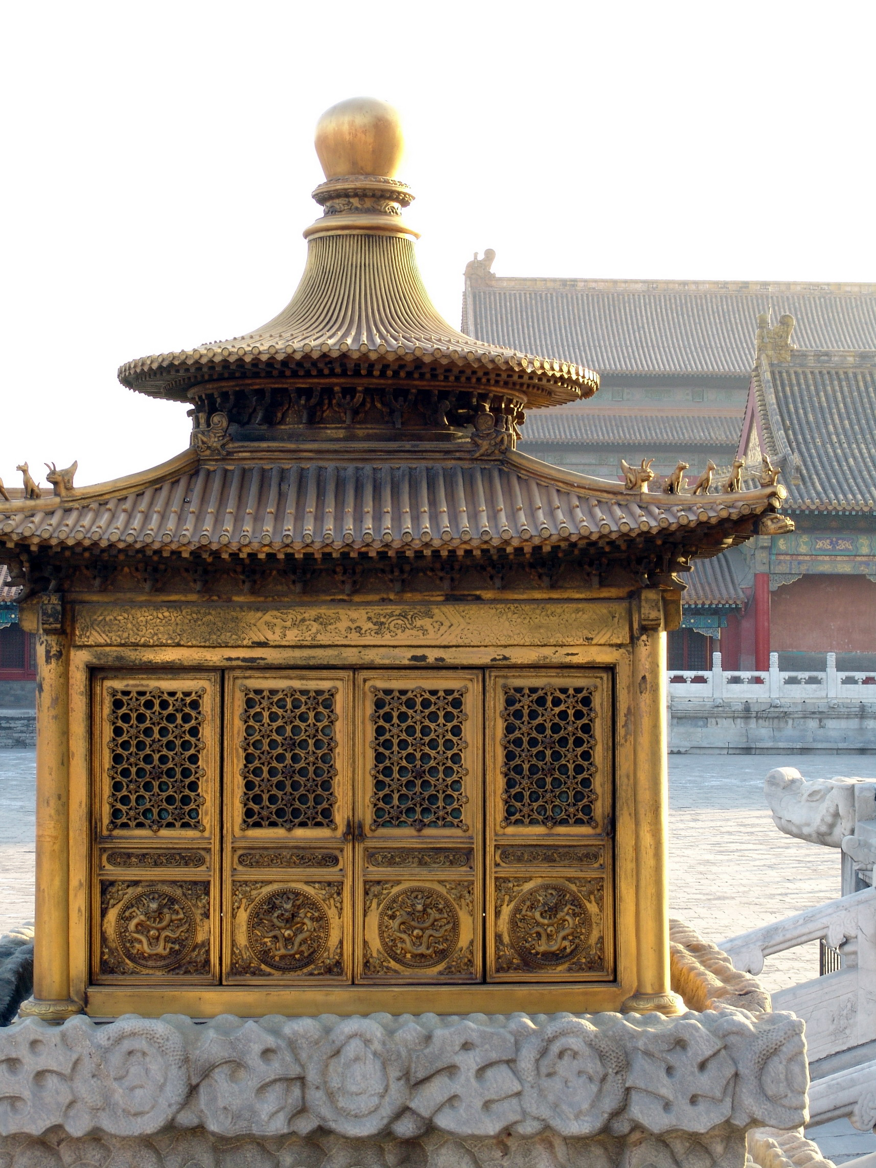 Forbidden City